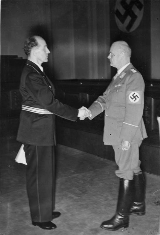 Roland Freisler und Dr. Otto Thierack ADN-ZB/Archiv Faschistisches Deutschland 1933-45 Der faschistische Reichsjustizminister Dr. Thierack (rechts) führt Ende August 1942 den neuen Präsidenten des Volksgerichtshofes, Staatssekretär Dr. Freisler (links), in sein Amt ein. Abgebildete Personen: Thierack, Otto Georg Dr.: Reichsminister der Justiz, Präsident des Volksgerichtshofes, Deutschland (GND 124864309) Freisler, Roland Dr.: Präsident des Volksgerichtshofes, Deutschland (GND 118693093)